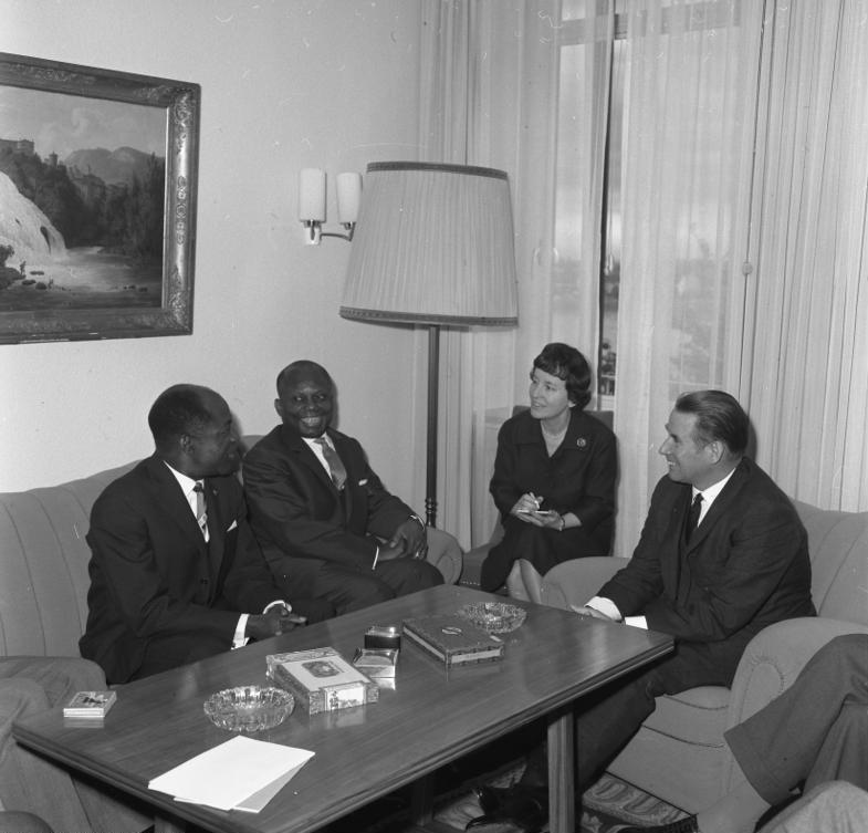 Besuch des Außenminister von Gabun, Jean Hilaire Aubame, Empfang bei BM Schröder im Auswärtigen Amt